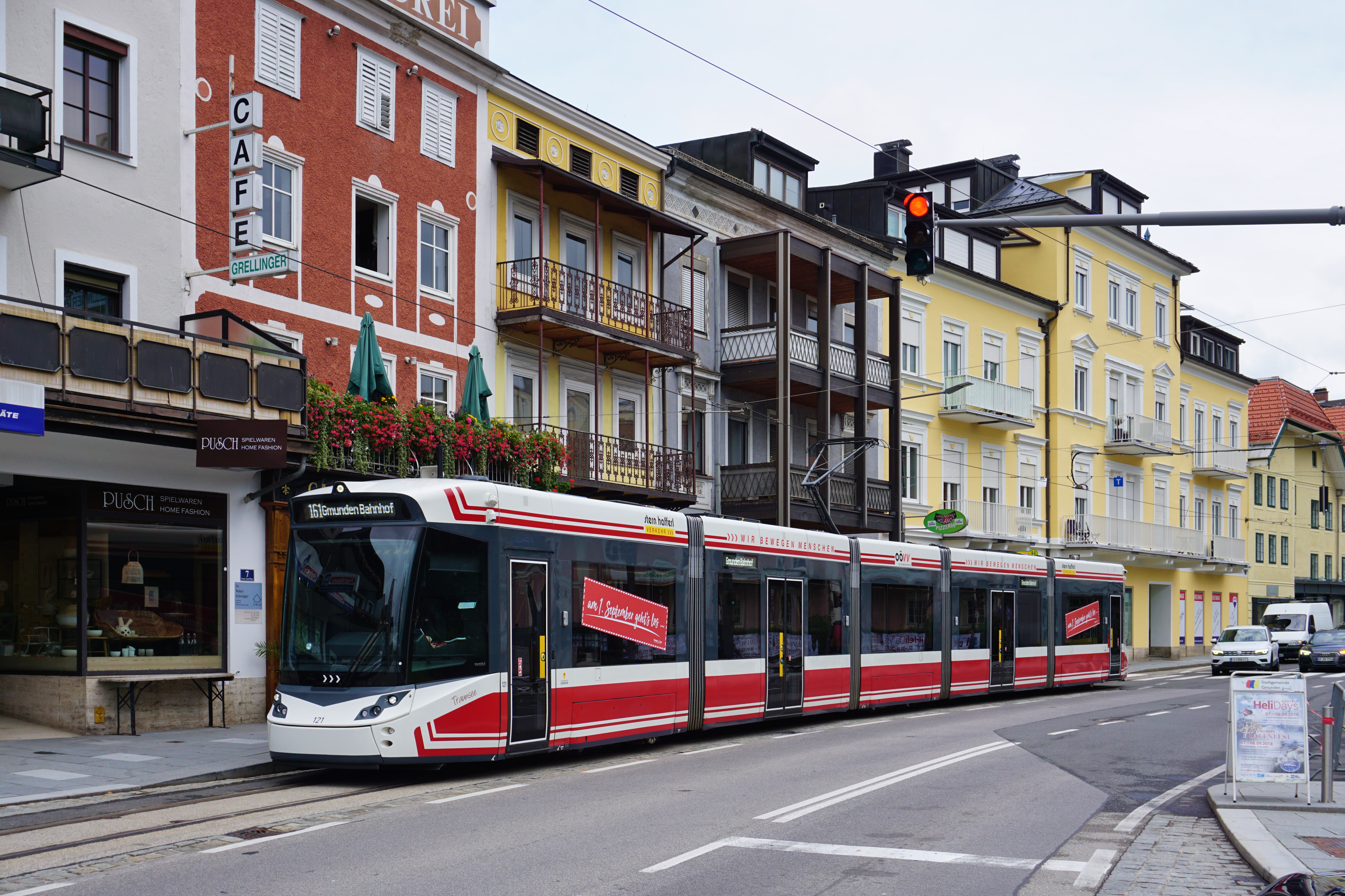 ET121 der Traunseetram in der Hst. Franz-Josef-Platz auf der Fahrt nach Gmunden Bahnhof